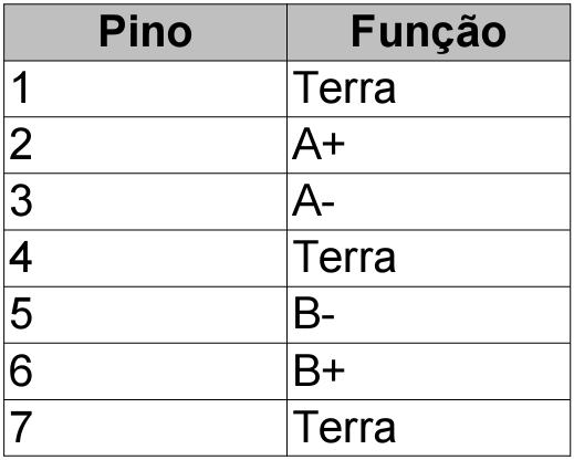 Imagem que mostra a função dos pinos de um cabo de dados Serial ATA.